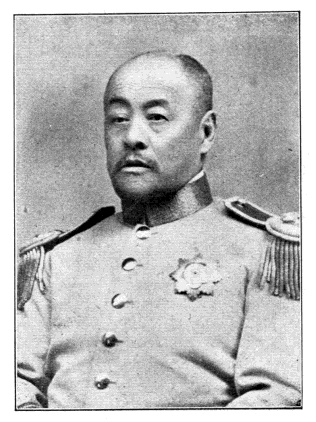 中文（台灣）: 中華民國國會議員